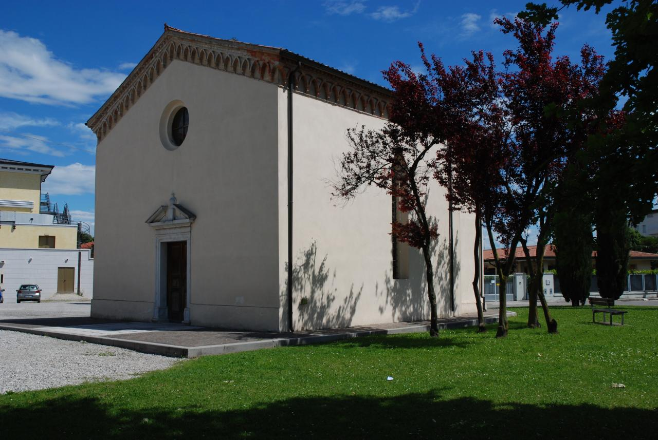 Chiesa di S.Rocco a Casarsa della Delizia